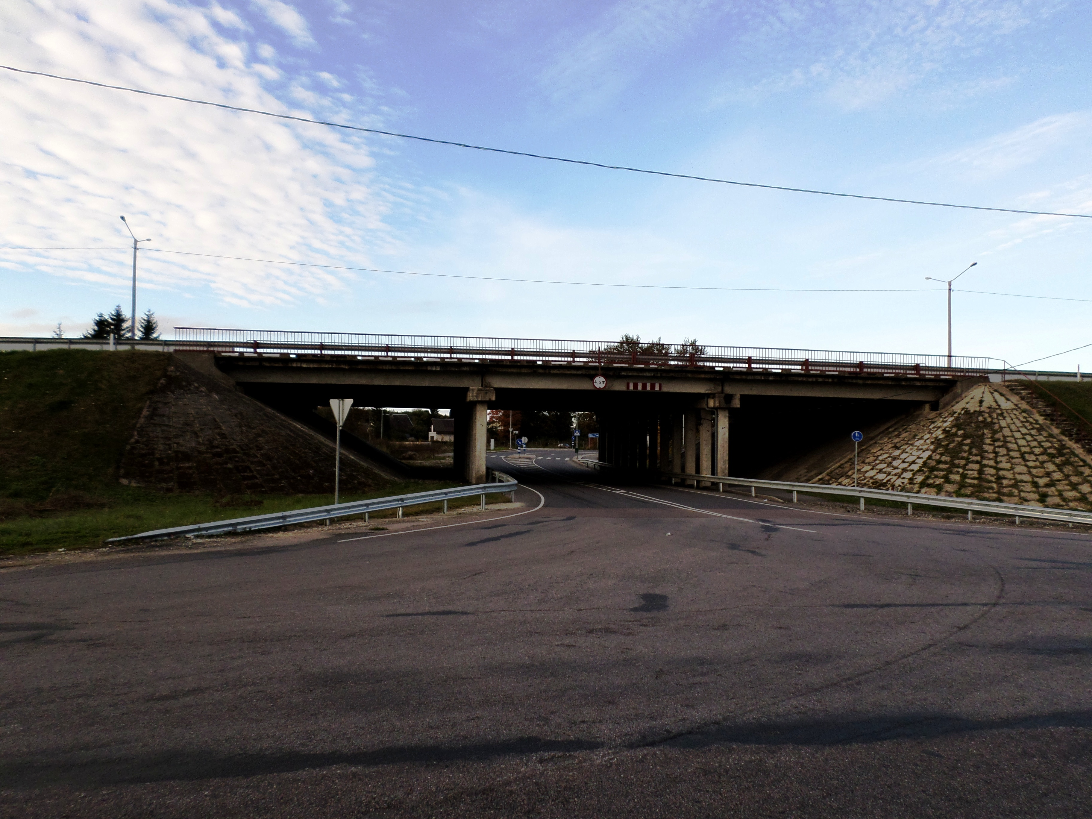 Assaku viadukt